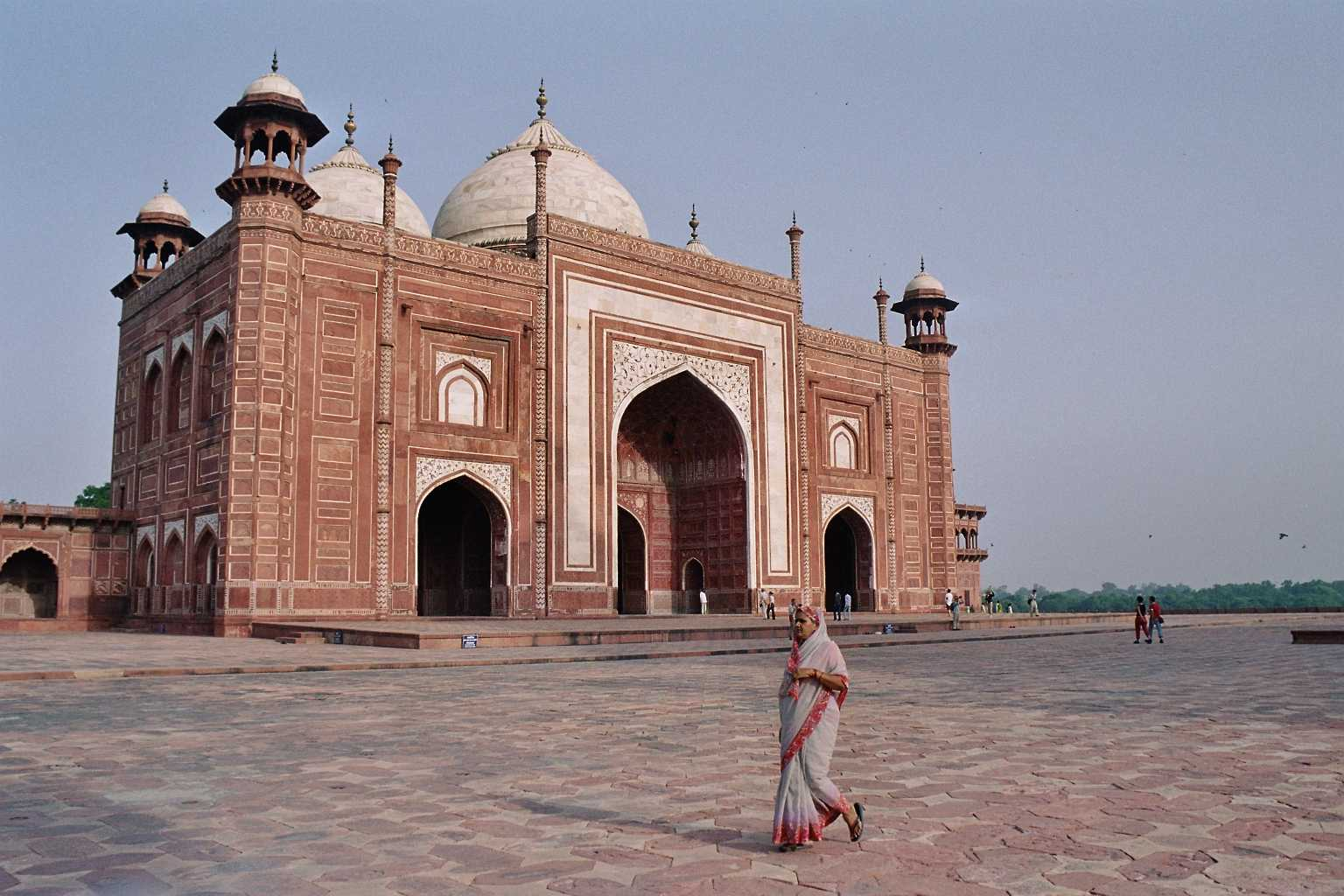 Taj Mahal in Agra, India. Picture take by Núria Pueyo, august 2005.